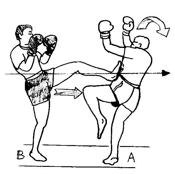 direct_posée-poussée.jpg